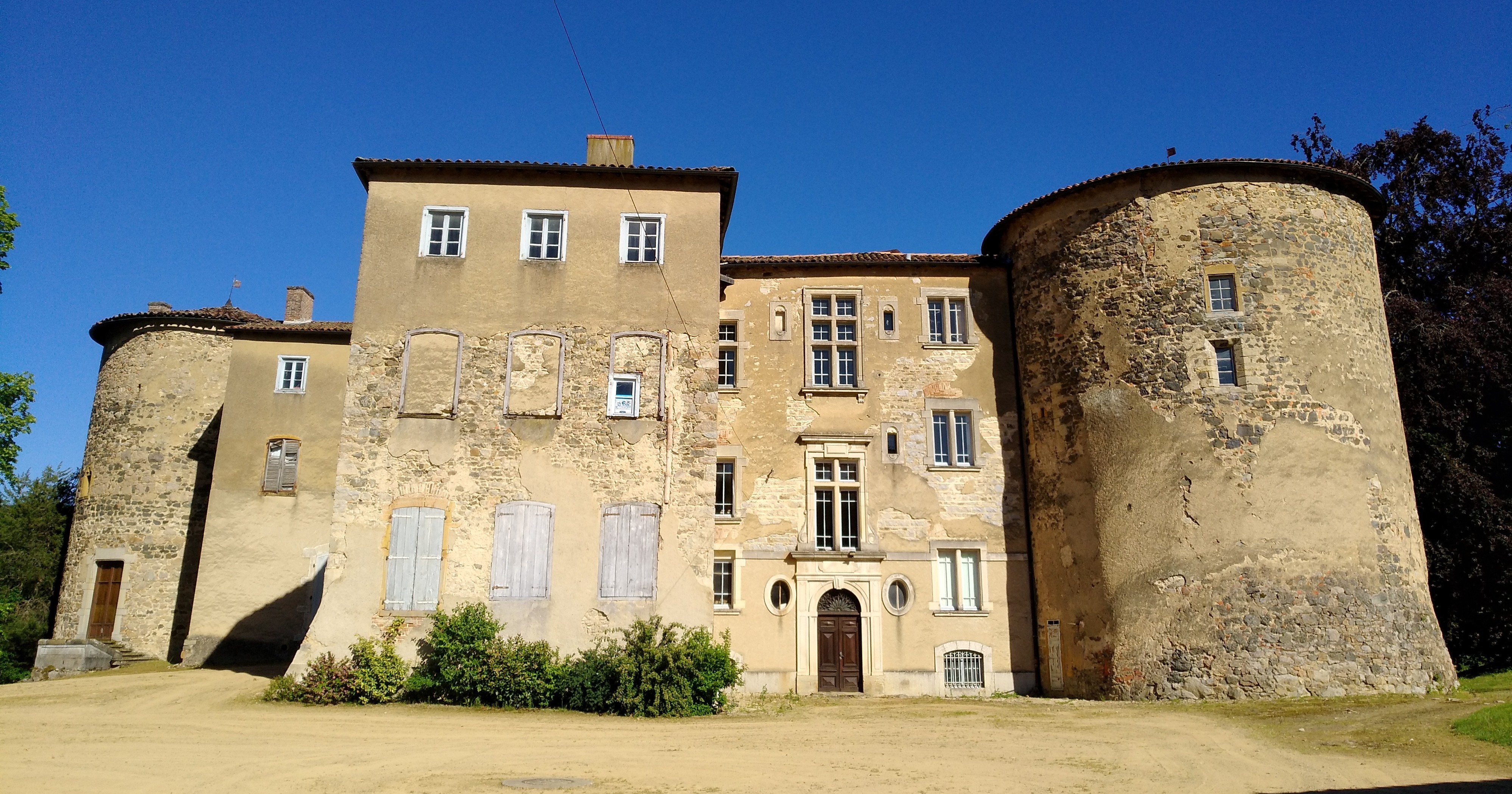 Vue du château de Joux, dans le département du Rhône (France).